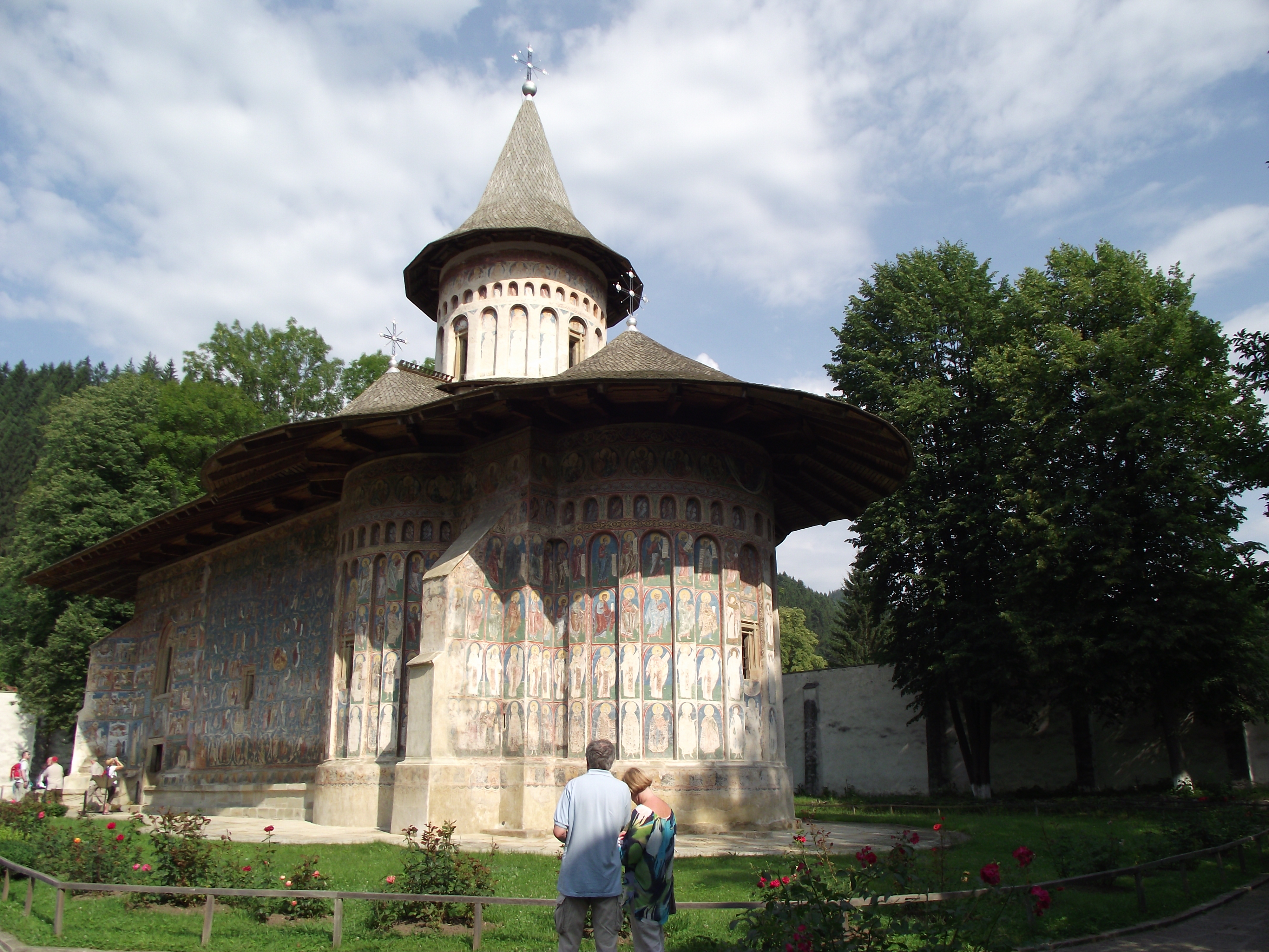 Manastirea Voronet- vedere frontala